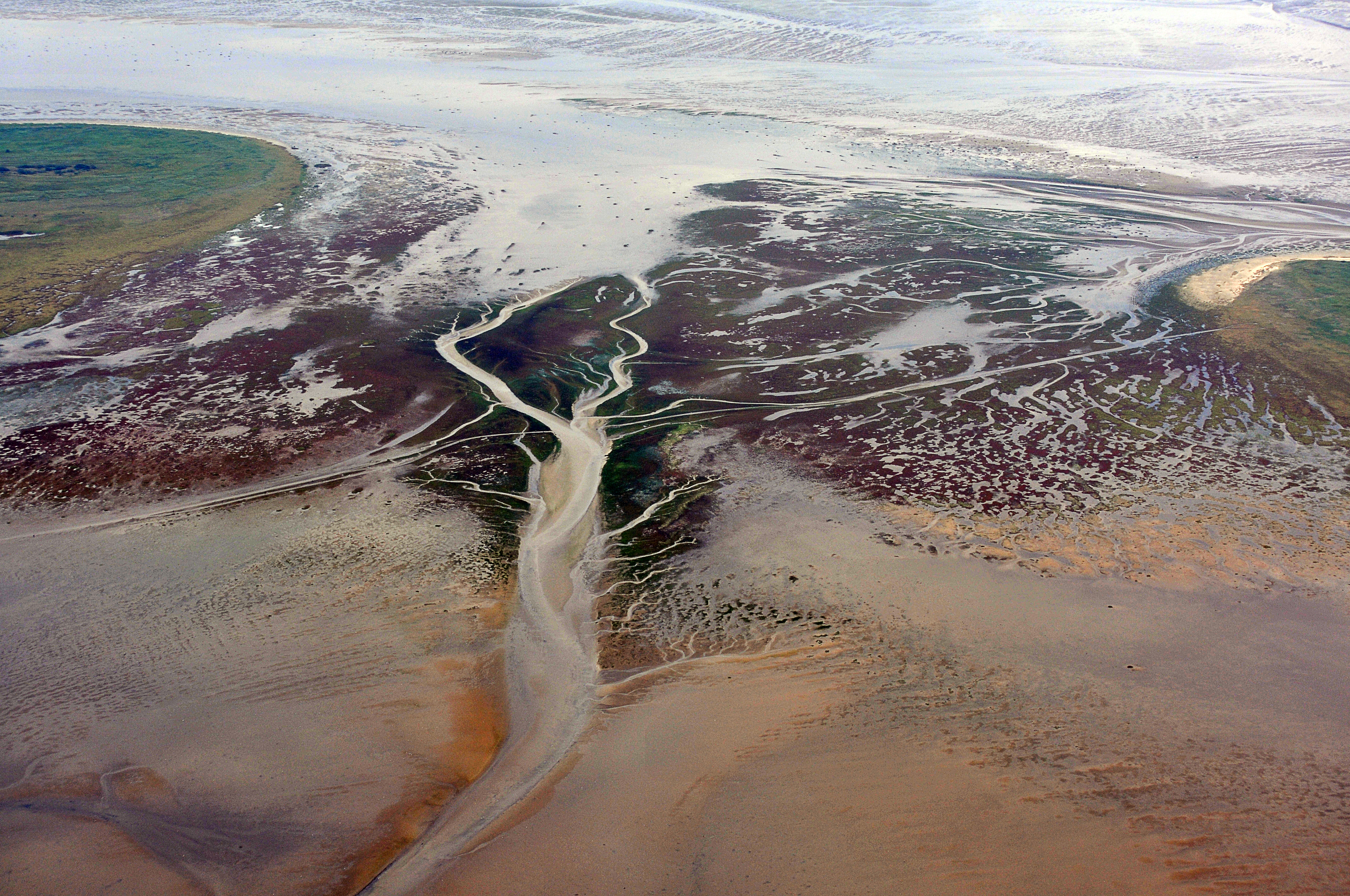 Fotoflug Nordsee, Nigehörn (links) und Scharhörn (rechts)